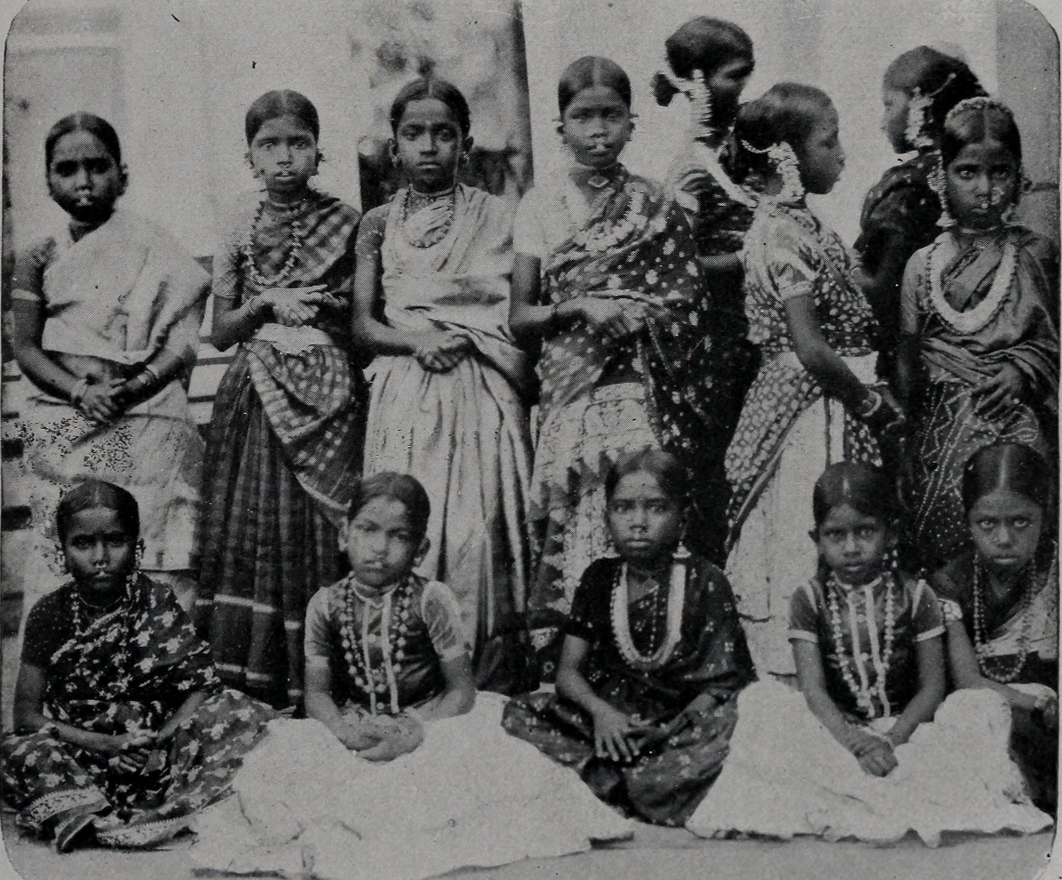 Jeunes élèves de lécole de Karikal (Photo d'archive) Exposition universelle et internationale (1905 : Liège, Belgium)